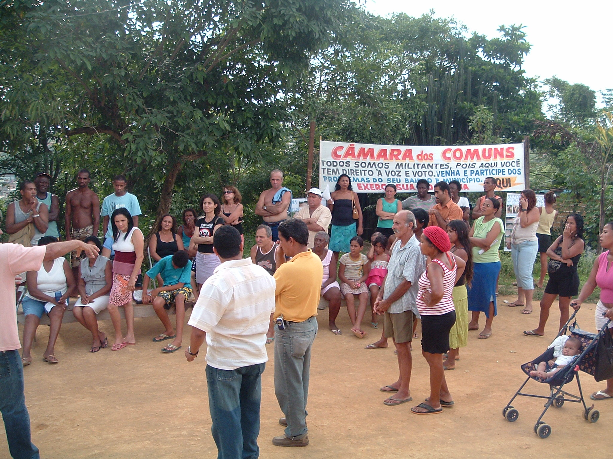 Assembléia Popular em Belford Roxo, Rio de Janeiro, Brasil